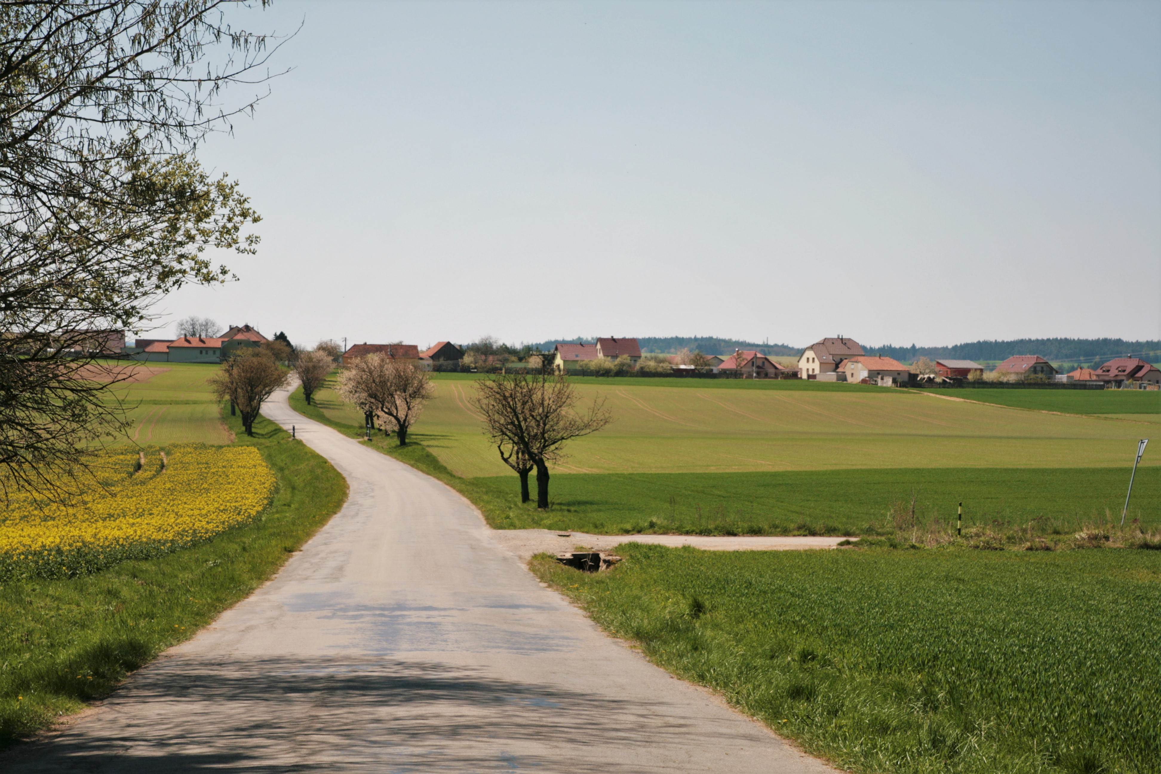 Obec Katov v okrese Brno-venkov. Pohled na obec ze silnice od Kuřimské Nové Vsi.